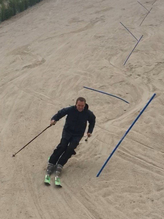 Sandski am Mont Kaolino, leichter Regen